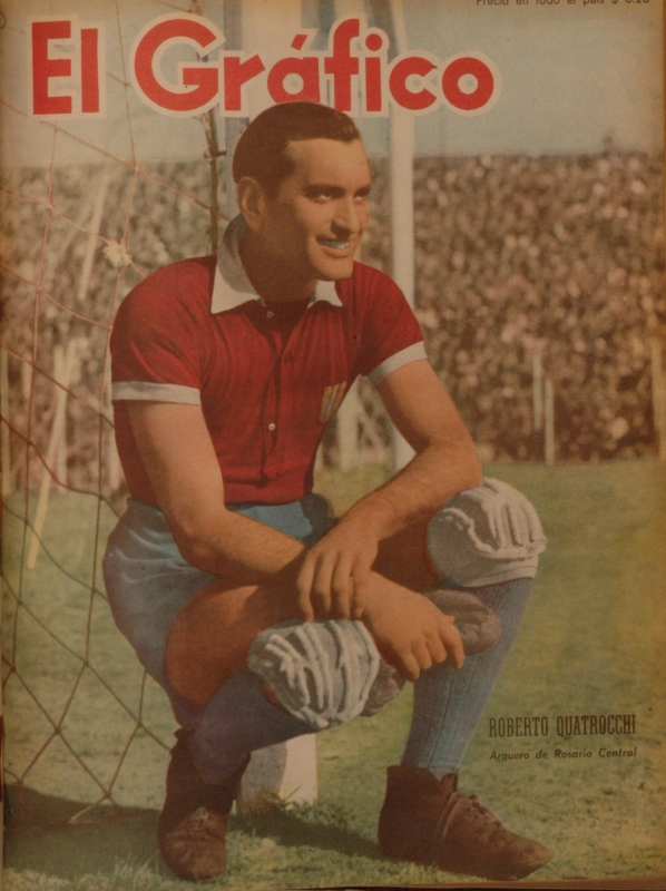 Roberto Quatrocchi